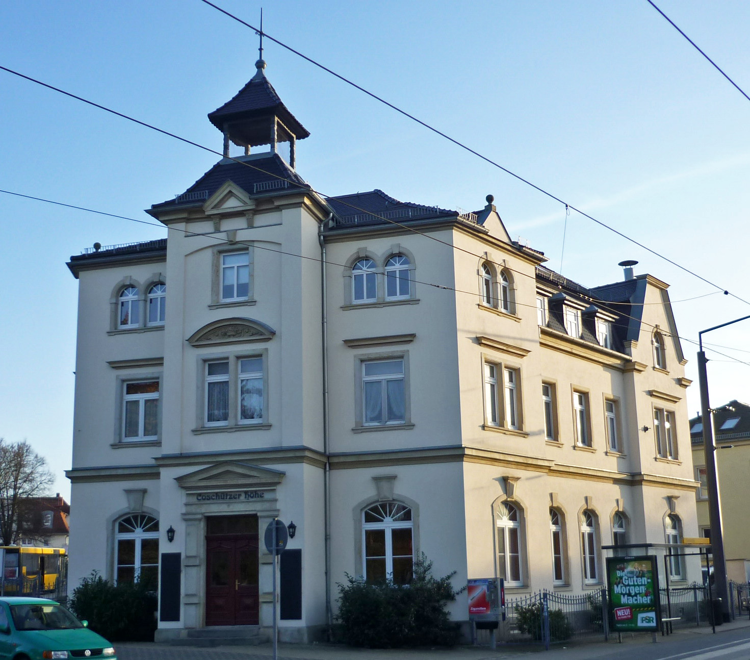 Karlsruher Str. 1 in Dresden-Coschütz